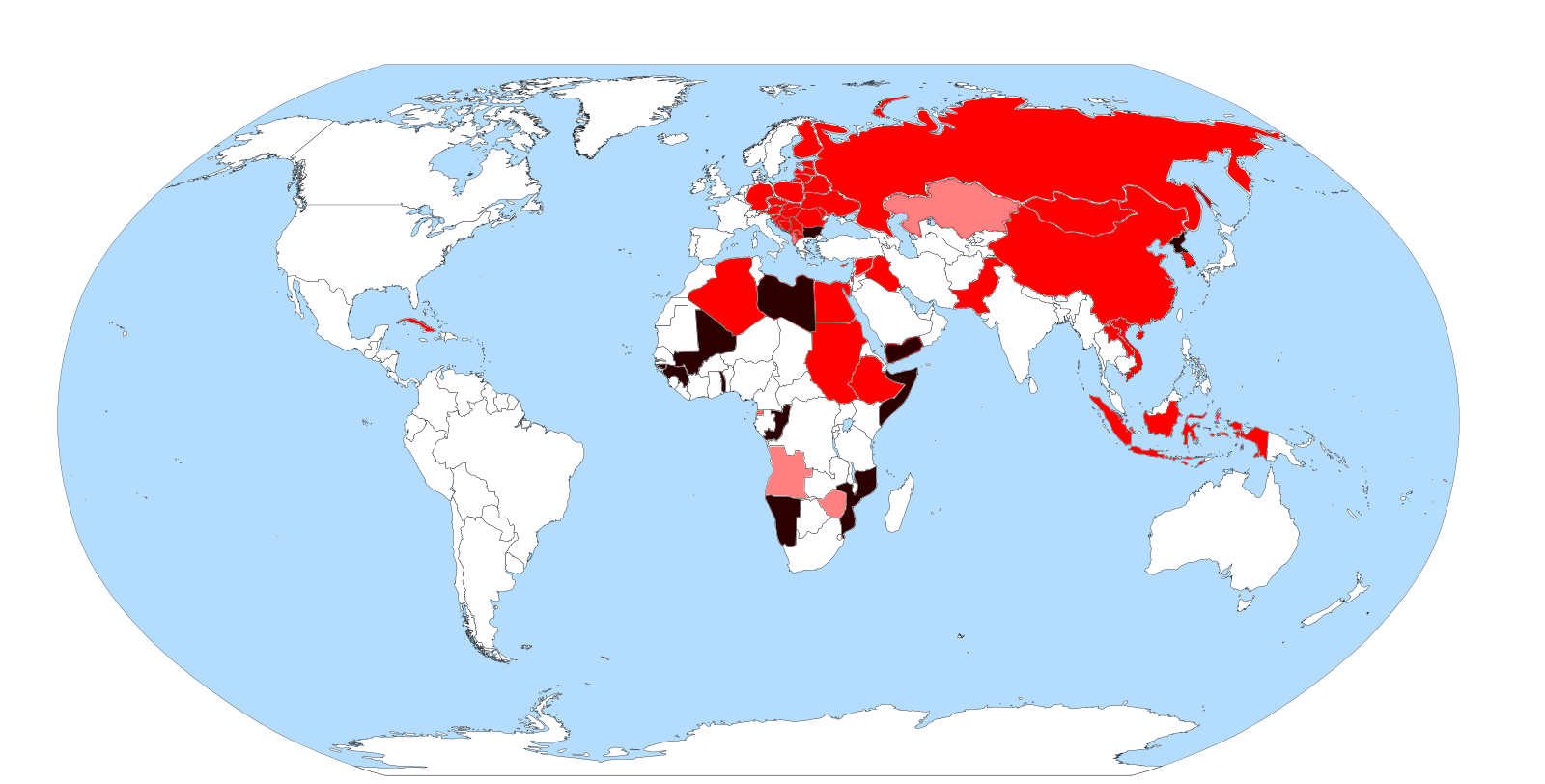 T34 world operators 2012 ver 0 62/2